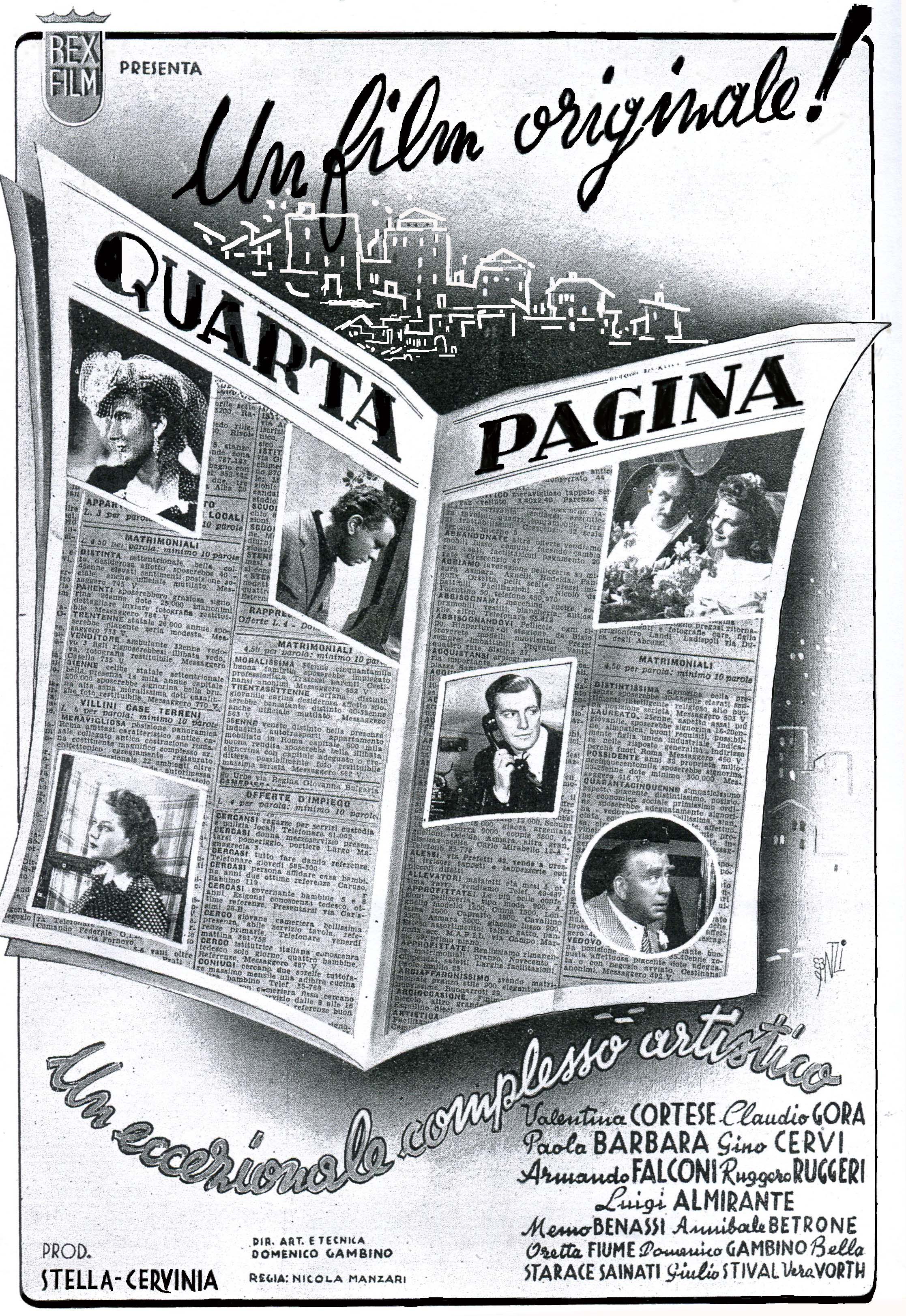 Immagine promozionale di Quarta pagina (Manzari, 1943)